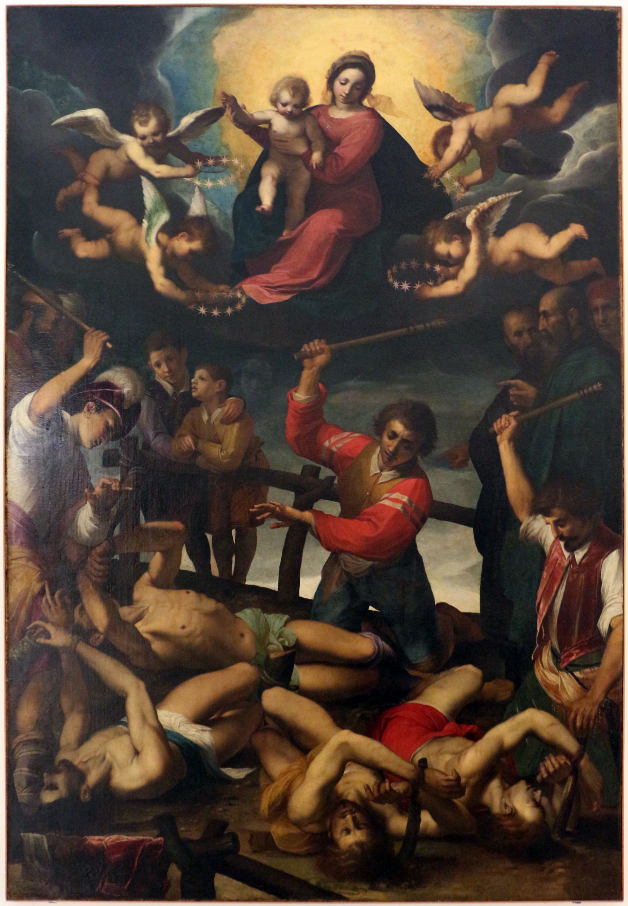 Pinacoteca di Ravenna This is a photo of a monument which is part of cultural heritage of Italy.